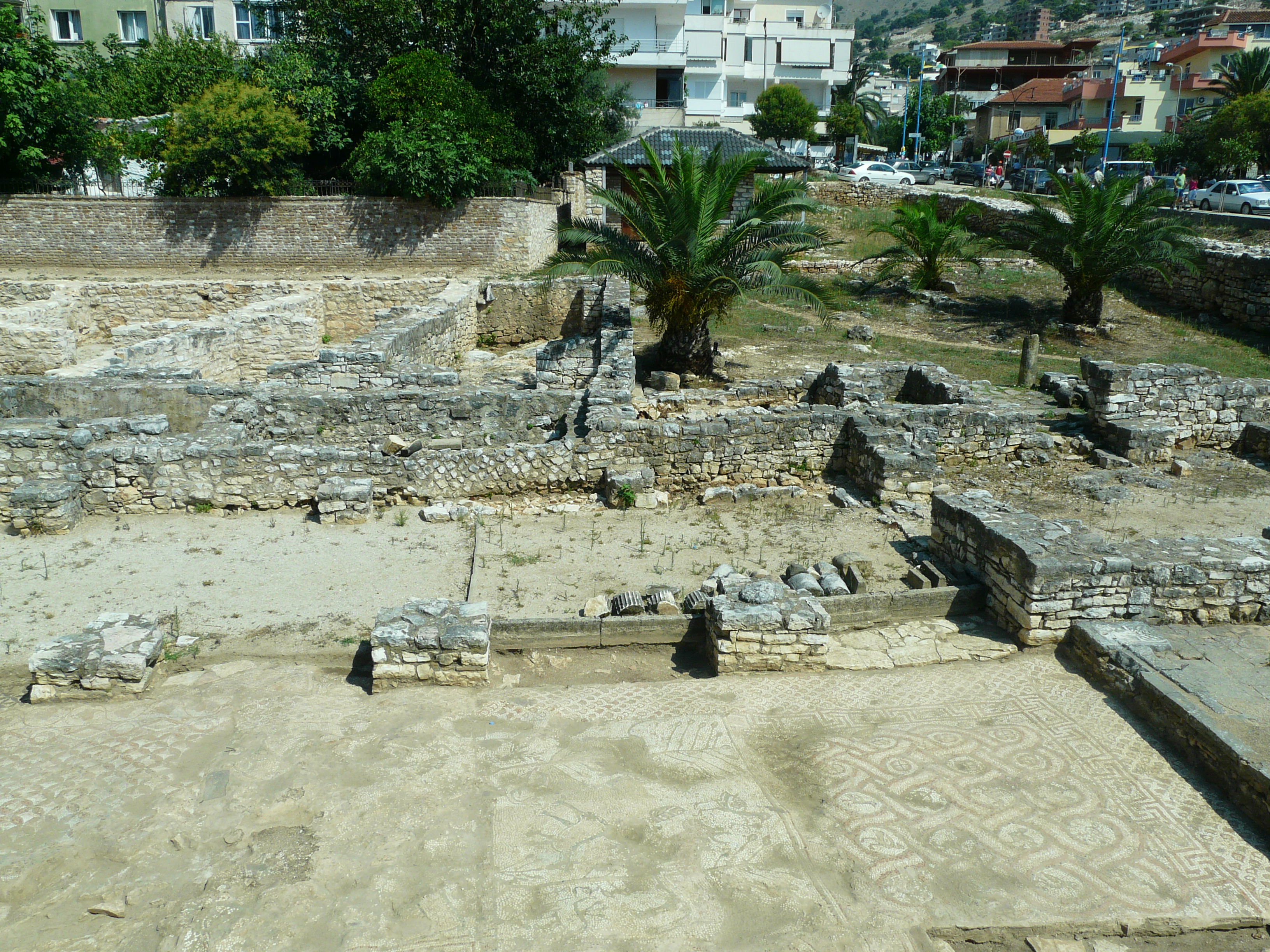 Corfu-Albania trip. Old ruins